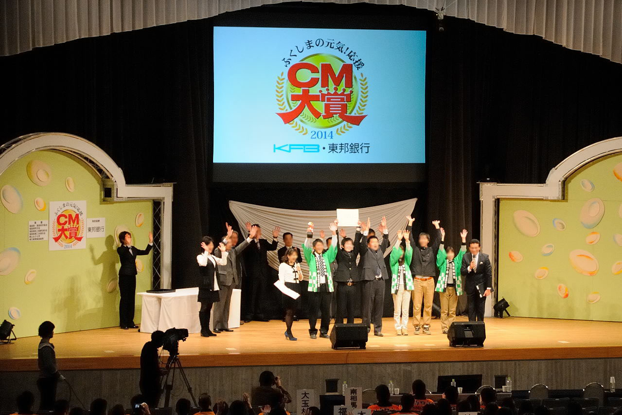 ふくしまの元気！応援ふるさとCM大賞2014 Location=郡山女子大学